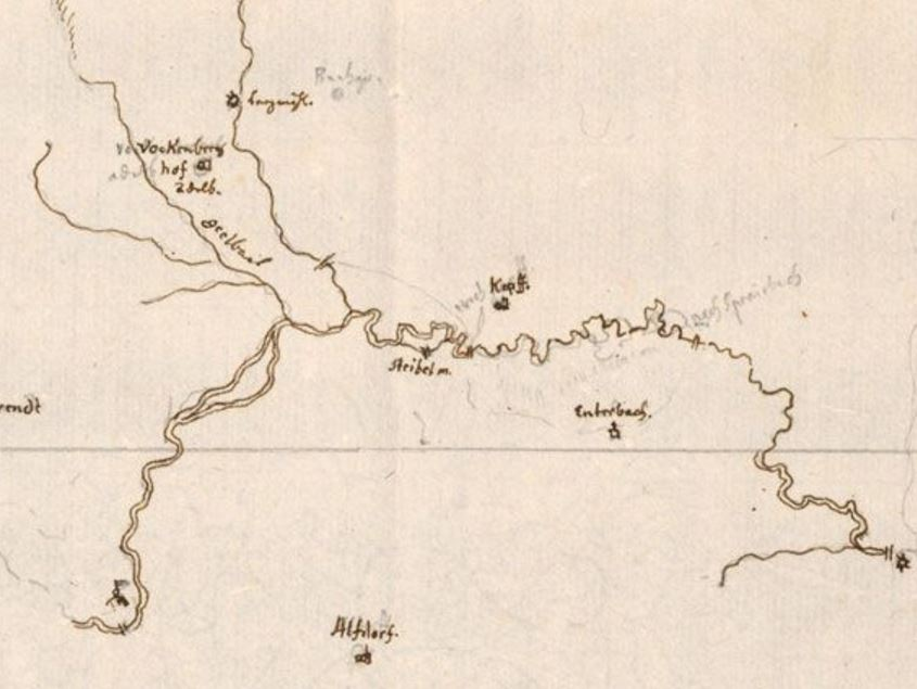 Kapf und Umgebung auf handgezeichneter Karte (Ausschnitt)